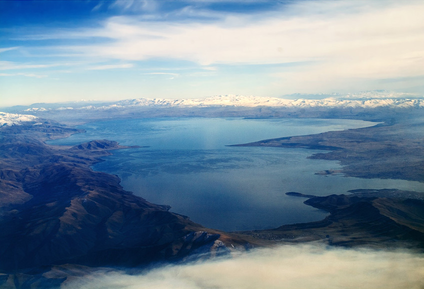 Вид с самолёта на озеро Севан (Армения). This work is free and may be used by anyone for any purpose. If you wish to use this content, you do not need to request permission as long as you follow any licensing requirements mentioned on this page.